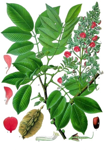 Nordamerikanische Baumarten. A Blattzweig, B Blütenzweig. 1 Fahne; 2 Flügel; 3 Kiel; 4 Staubblattbündel; 5 Pistill; 6 Frucht; 7 Samen. A, B etwas verkleinert, 6 natürliche Grösse, 1, 2, 3, 4, 5, 7 vergrössert.